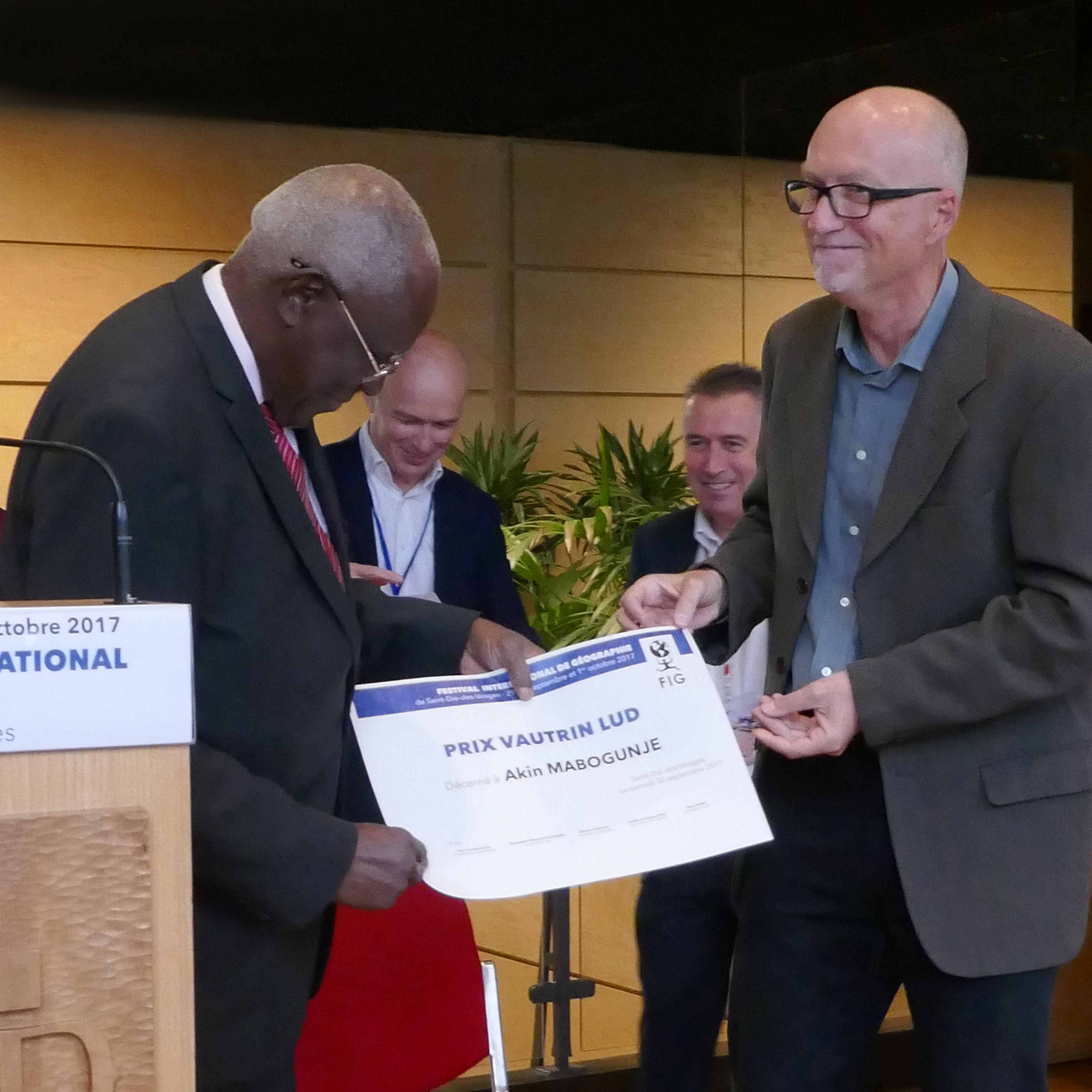 Le professeur Akin Mabogunje (Nigeria) recevant le prix Vautrin Lud des mains de Jean-Christophe Gay, secrétaire général, lors du Template:28e Festival international de géographie.